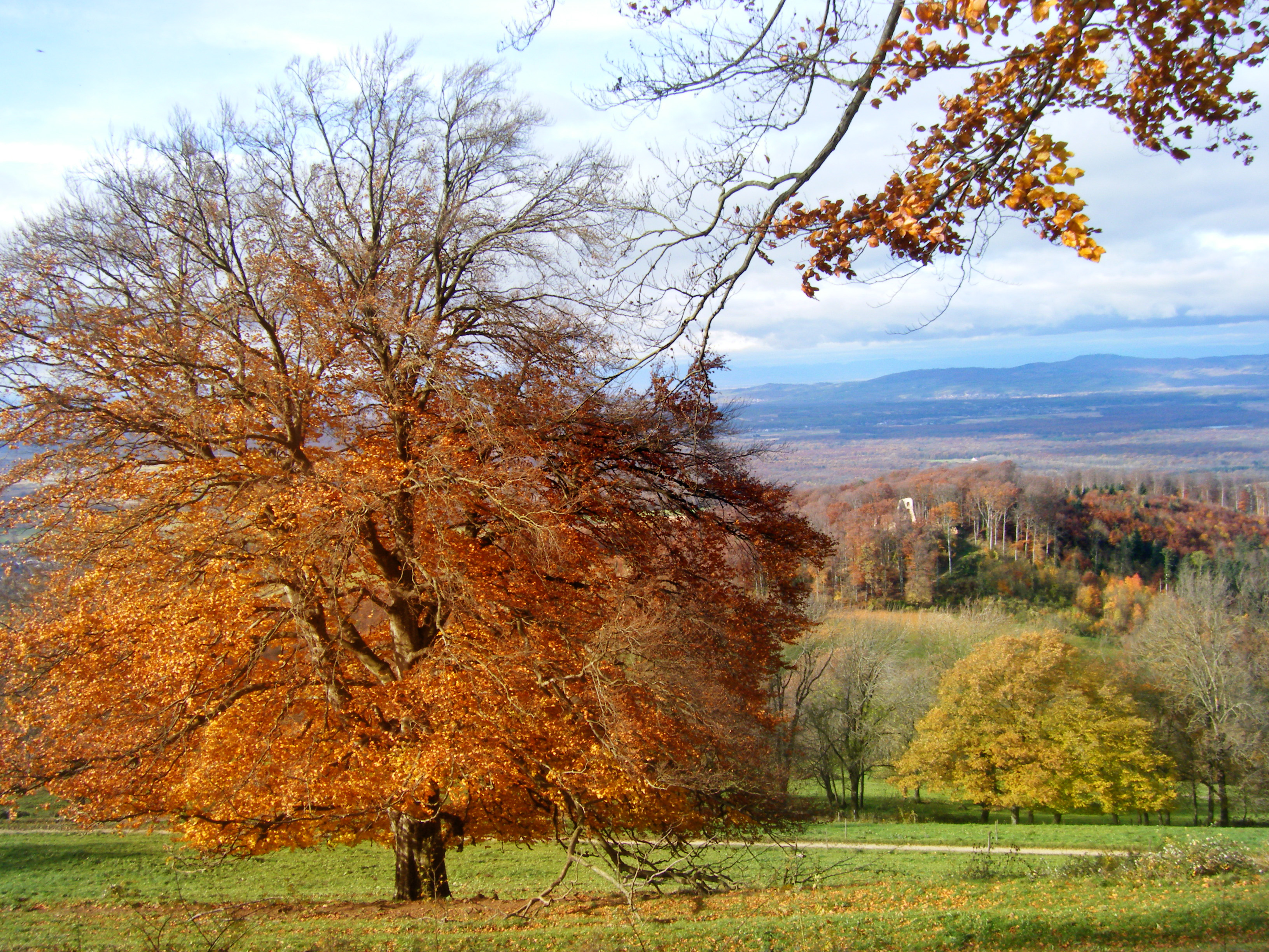 FFH-Gebiet 8012-342 (Schönberg mit Schwarzwaldhängen) und Landschaftsschutzgebiet WDPA ID 324240 (Schönberg). Blick auf die Ruine der Schneeburg und in die Rheinebene.